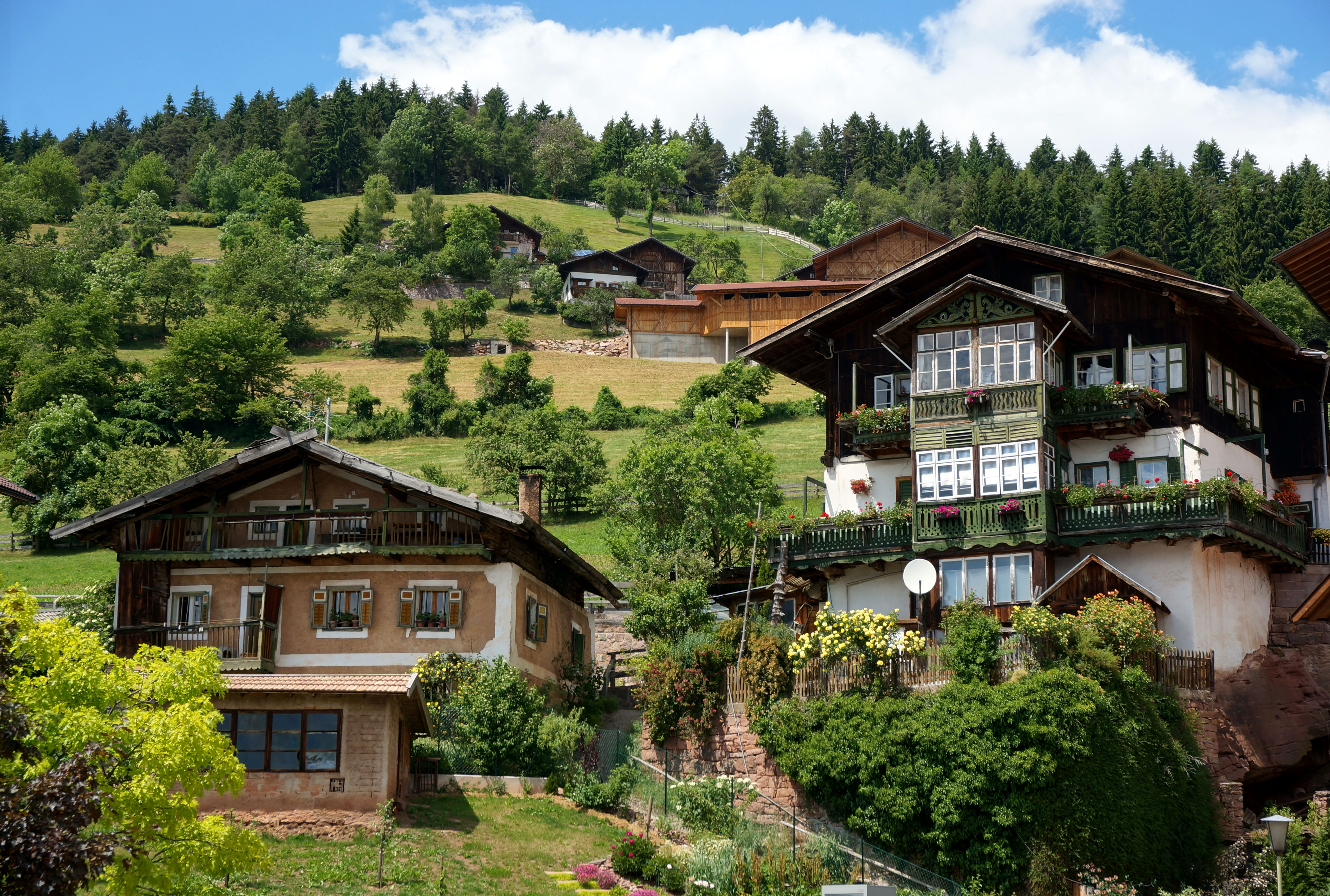 Alte Bürgerhäuser in Mölten in Südtirol. Rechts das denkmalgeschützte Gebäude Reisergass 5-7 (die vom Landesdenkmalamt angegebene Adresse Dorf 41/A ist veraltet.)